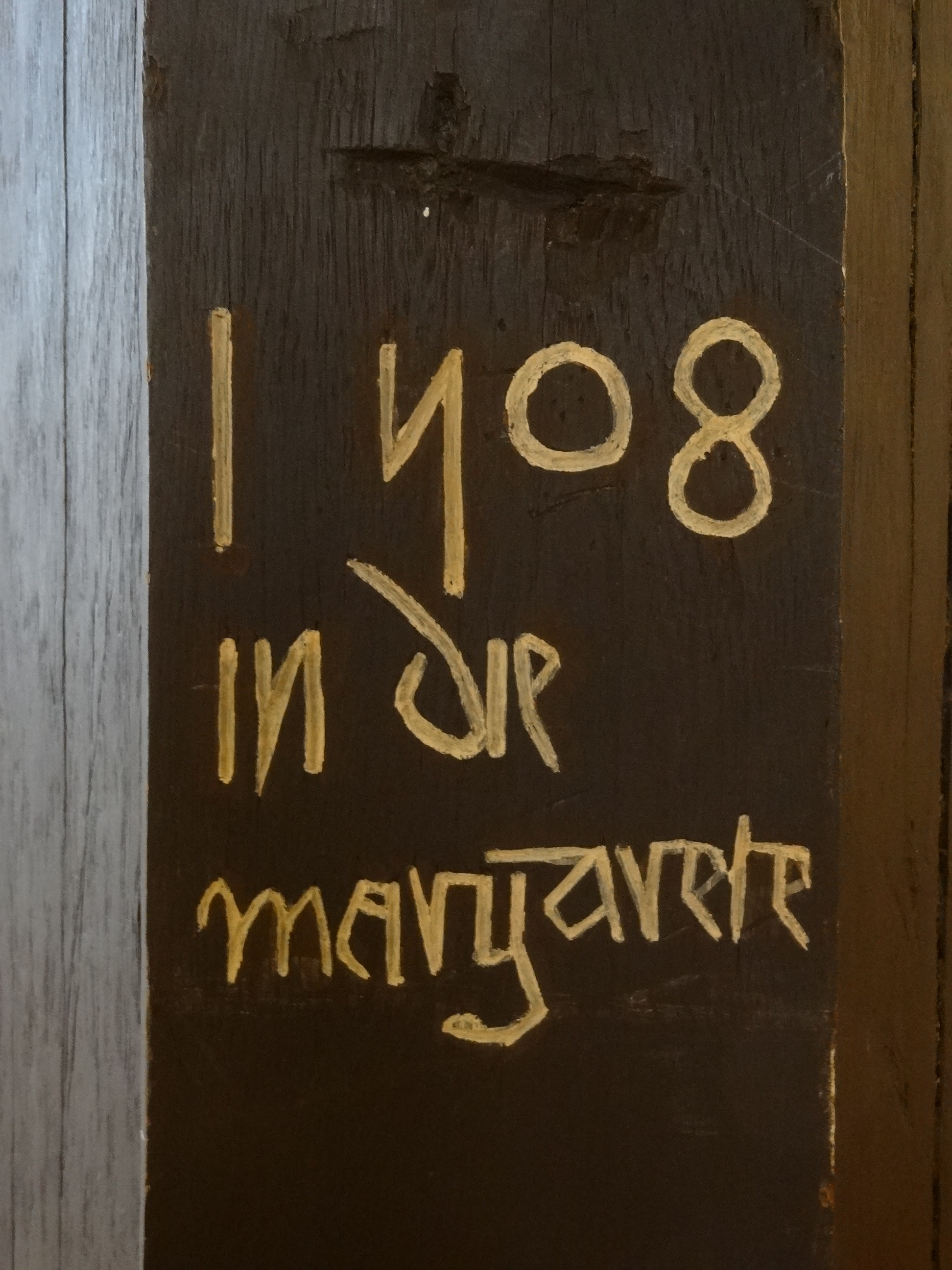 Ehemalige Hospitalkapelle St. Wendelin (Butzbach)